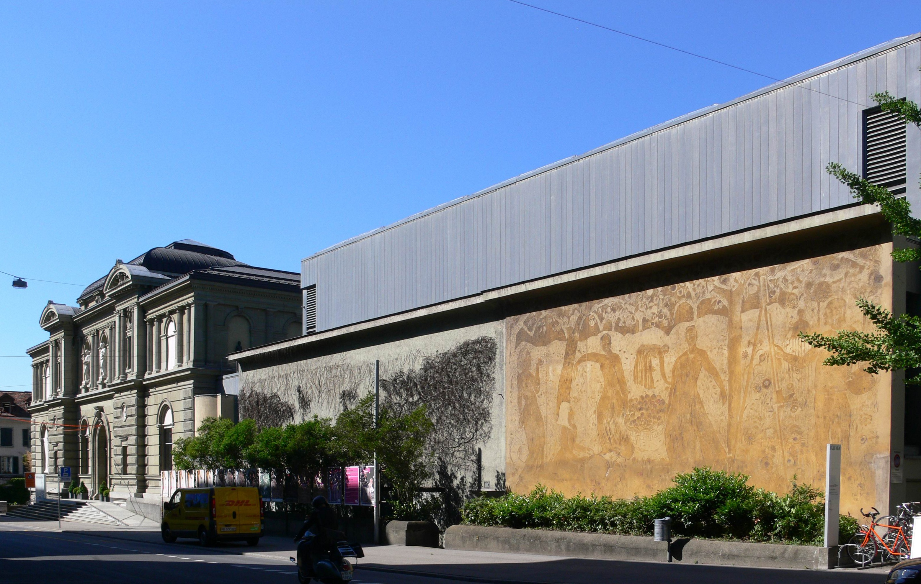 Kunstmuseum Bern; links der Altbau, rechts der Neubau von 1983, im Vordergrund die erhaltene Mauer des Neubaus von 1932–1936 mit der Wanddekoration von Cuno Amiet